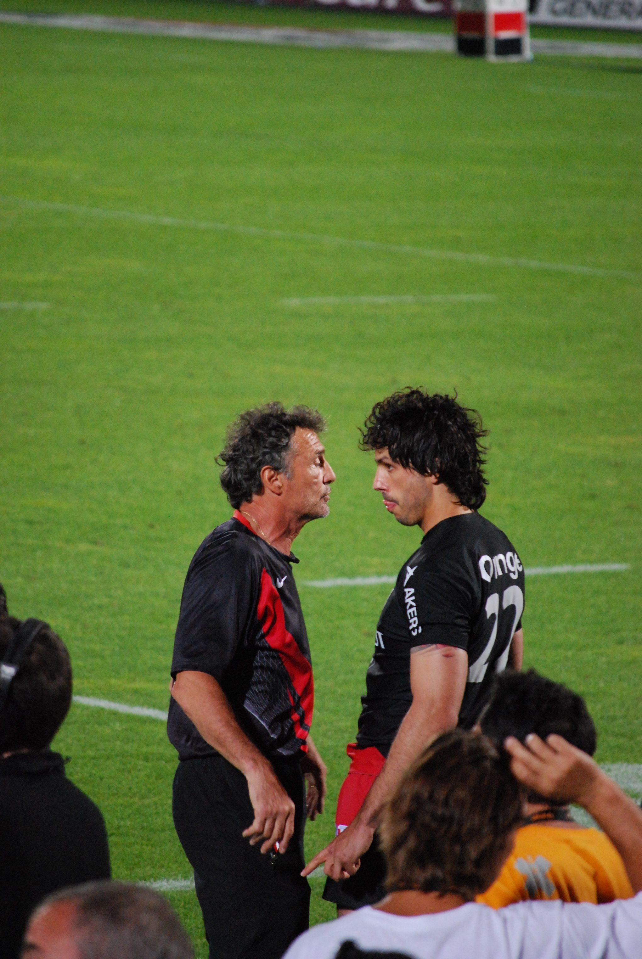 Clément Poitrenaud prend les consignes du coatch, Guy Novès